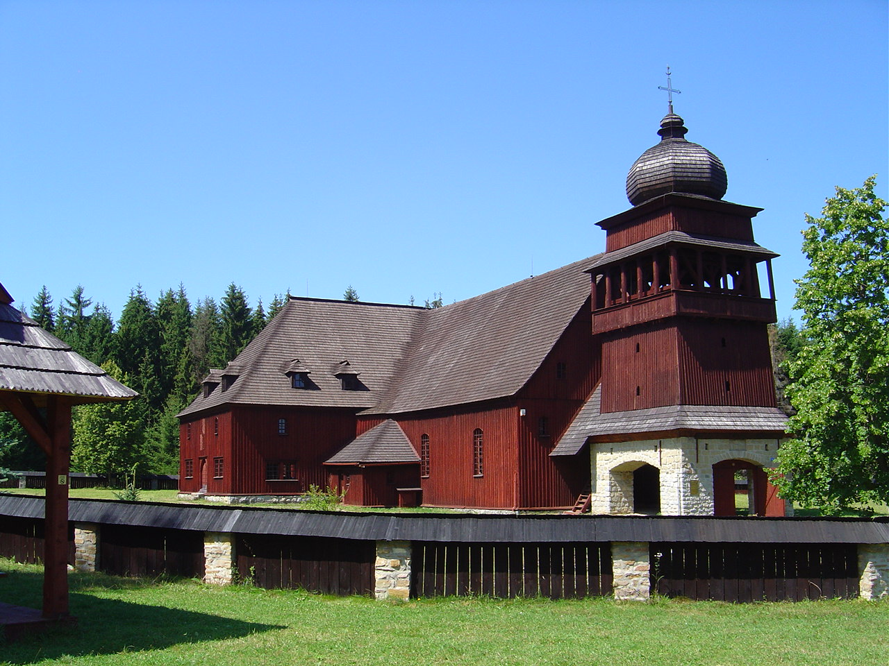 Drevený artikulárny kostol z Paludze, Svätý Kríž, autor fotografie Kristián Slimák Kategória:Obrázky budov